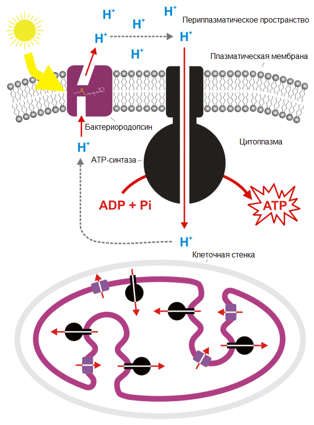 Бесхлорофилльный фотосинтез. Принцип работы бактериородопсина. Перевод англоязычной версии, автор Darekk2.en.